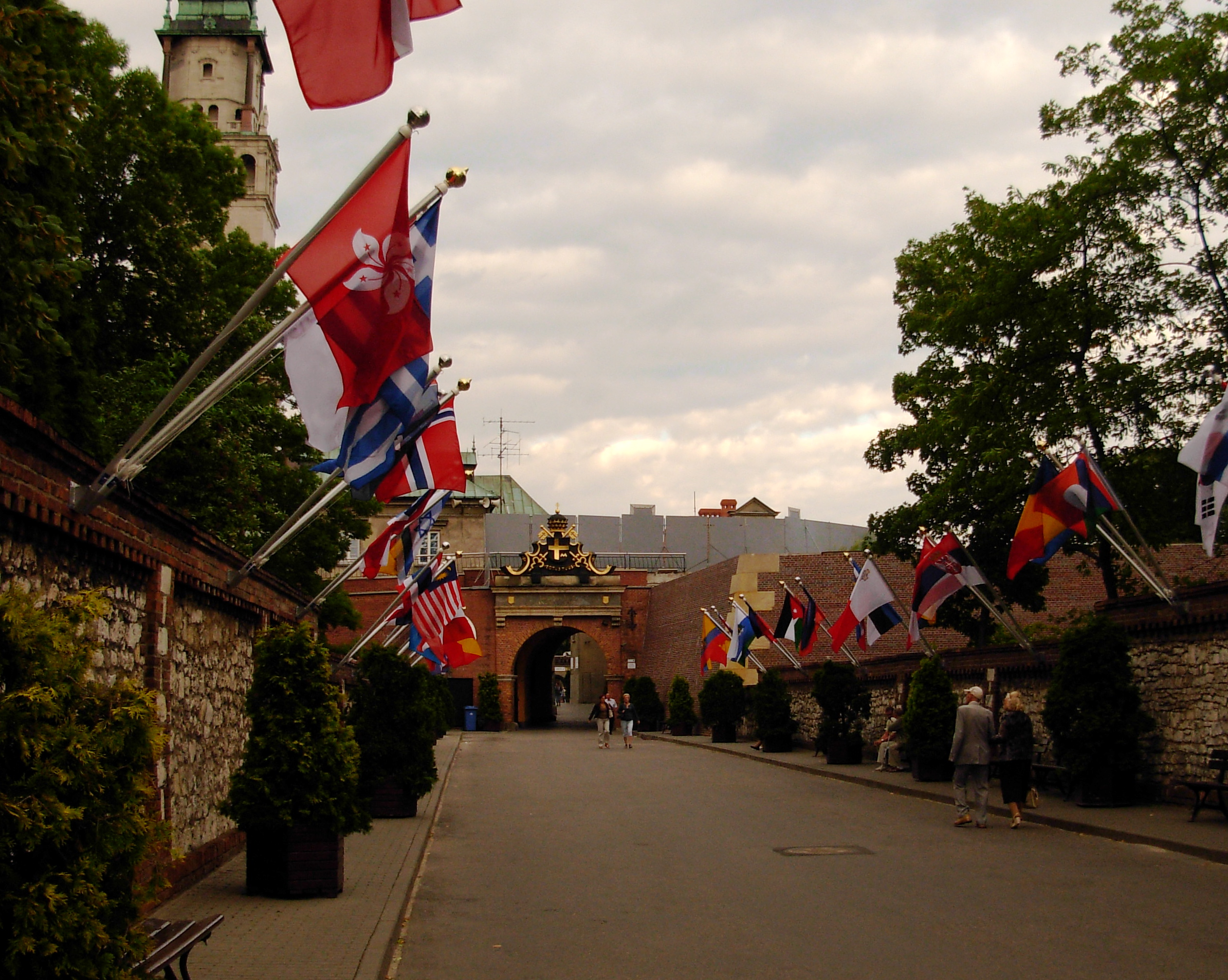 Čenstakavos Jasna Gora vienuolynas - vartai